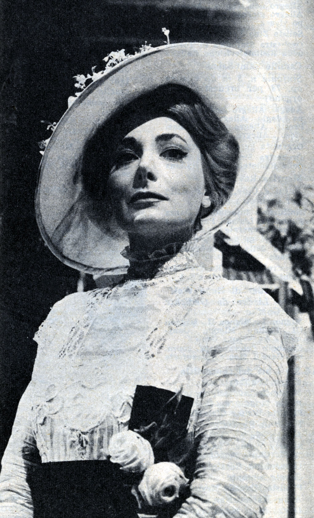 photo from magazine Radiocorriere, 1957